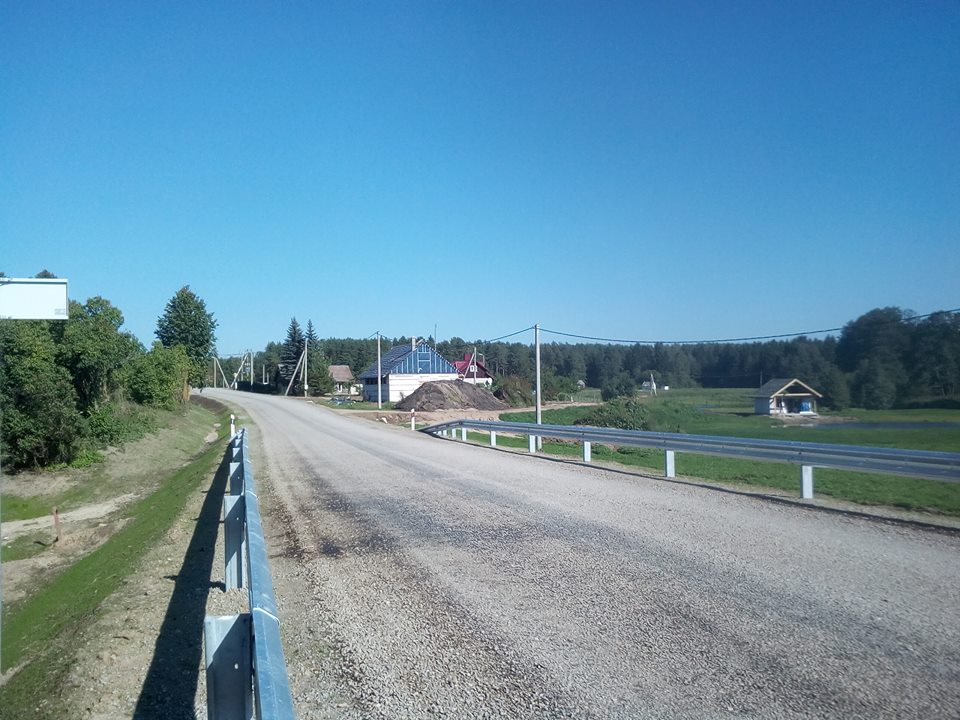 Bakieriškės (Paluknio sen.) po kelio remonto, 2017 rugsėjis